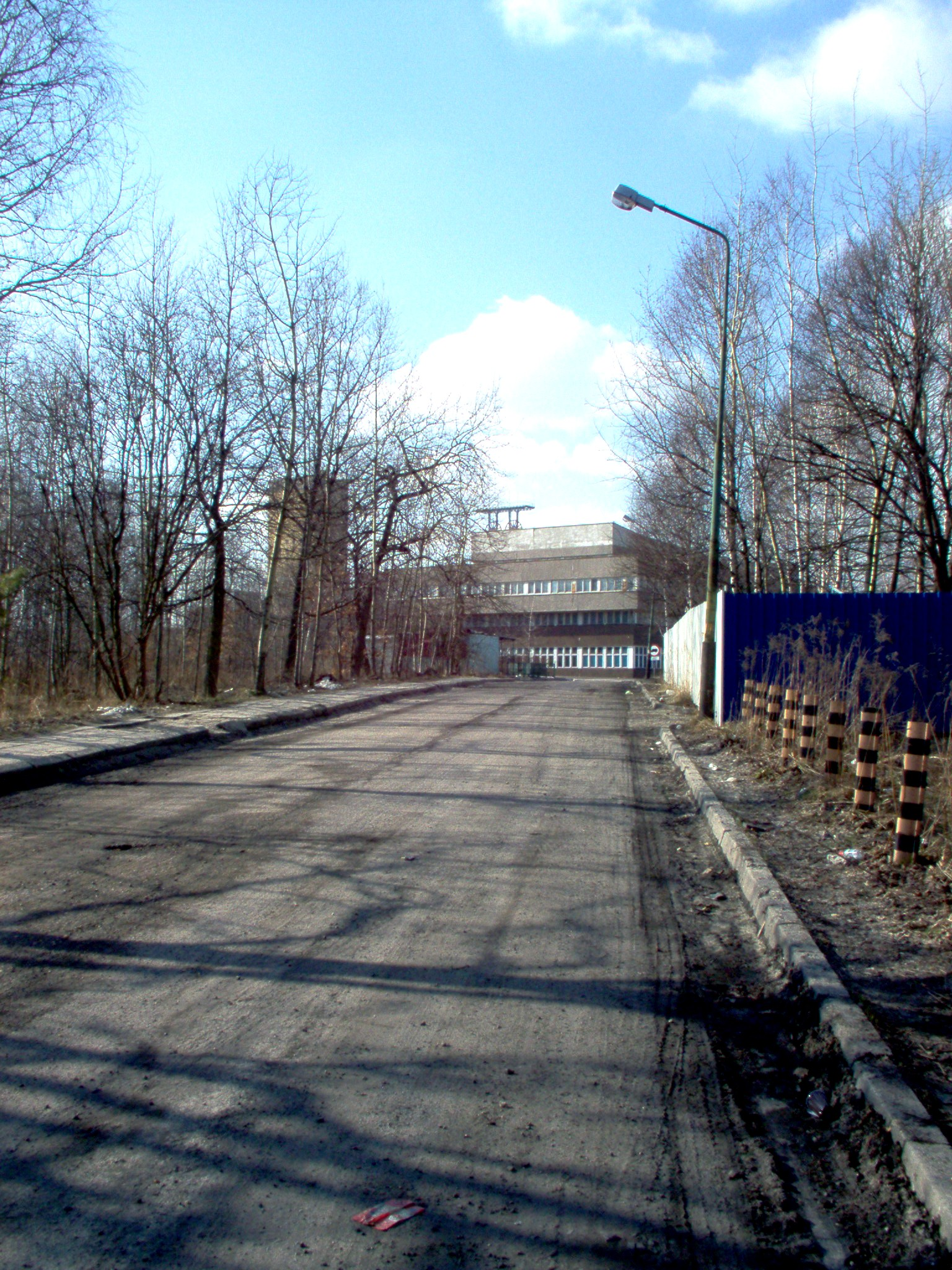 Katowice Giszowiec - KWK Staszic grafika mojego autorstwa wykonana 20.03.2005